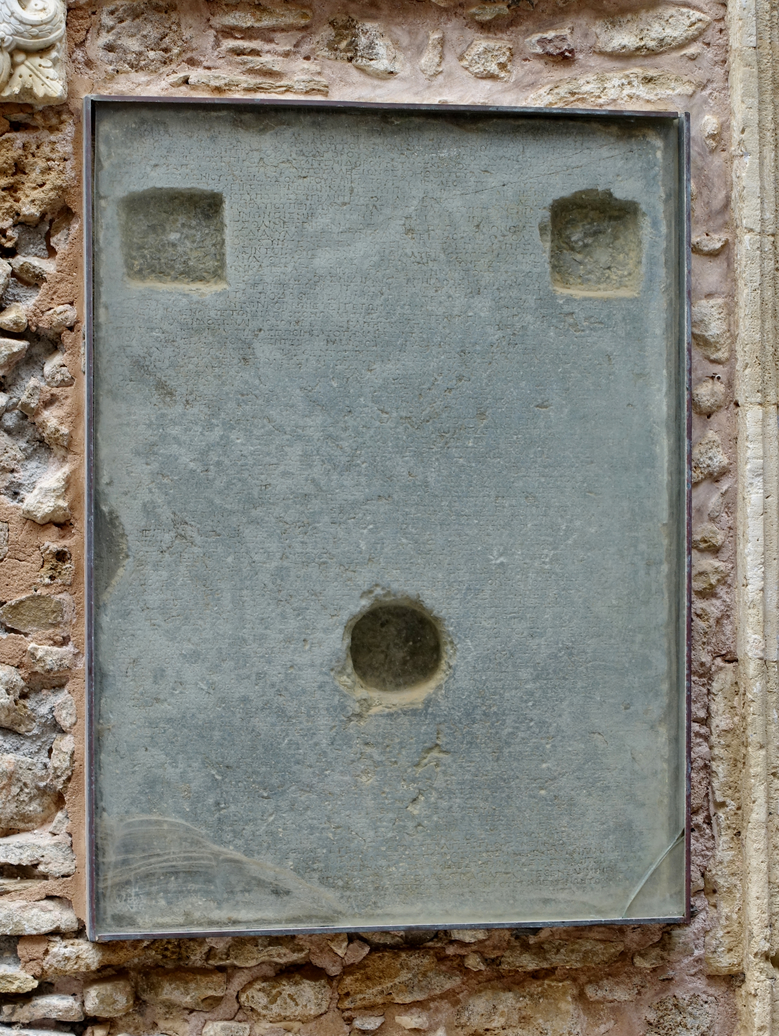 Inschrift des Schiedsspruchs von Magnesia von 132 v. Chr. zugunsten Itanos’ bezüglich der Kontrolle über den Tempel des Diktäischen Zeus in Roussolakkos im Moni Toplou (Μονή Τοπλού), Kloster an der Nordostküste Kretas bei Palekastro (Παλαίκαστρο), Gemeinde Sitia, Kreta, Griechenland